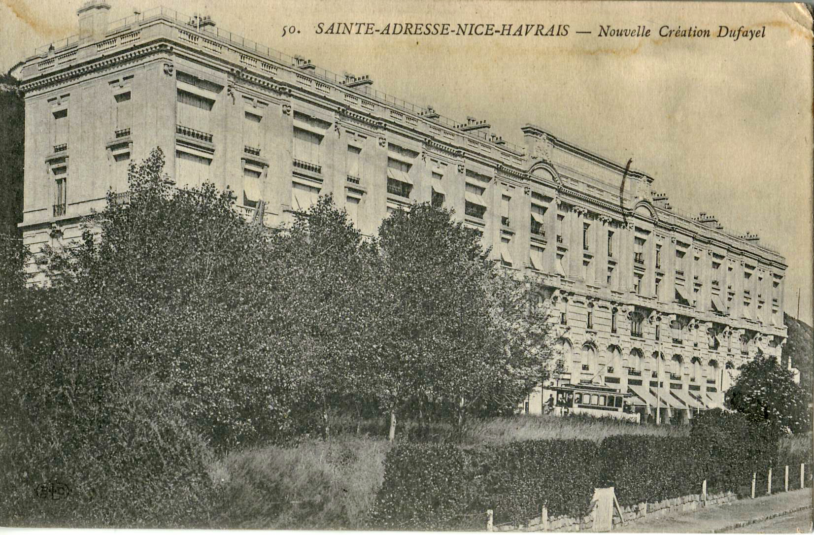 Carte postale ancienne éditée par ELD, n°50 :SAINTE-ADRESSE-NICE-HAVRAIS - Nouvelle création Dufayel